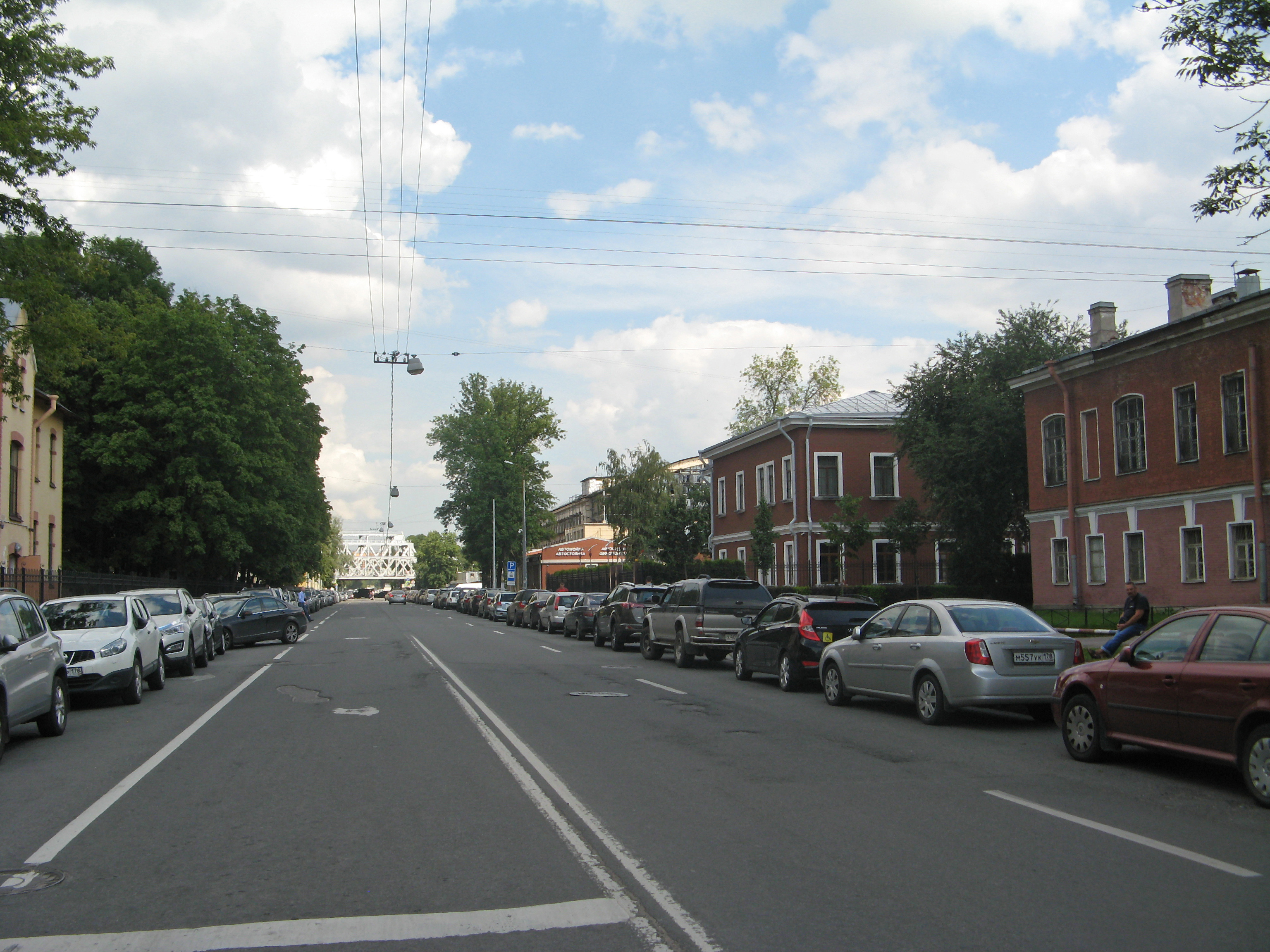 Литовская улица в Санкт-Петербурге